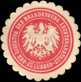 Siegel Der Direktor der Brandenburg. Idiotenanstalt zu Lübben